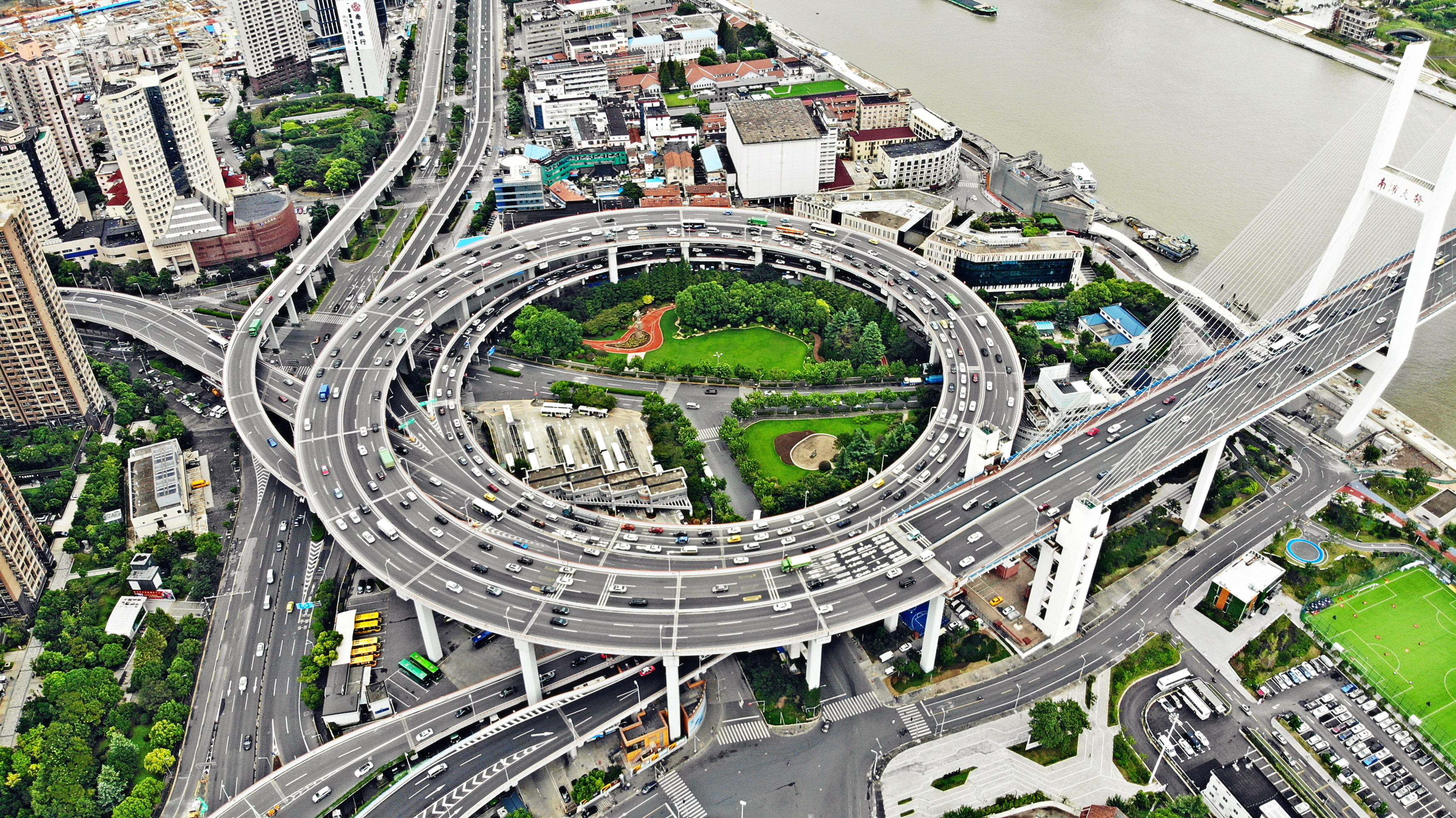 中文（中国大陆）: 上海南浦大桥 2018.9